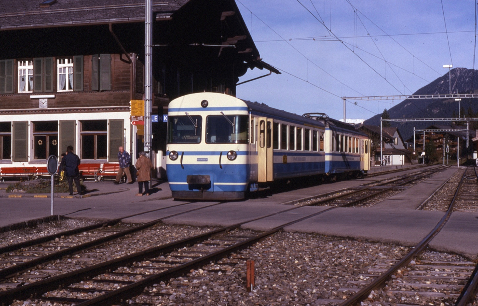 Chemin de fer Montreux - Oberland Bernois (MOB) Be4/4 no. 5003 seen at Lenk in Simmental on 8 November 1998 on train 520, 10:20 Lenk im Simmental to Zweisimmen.